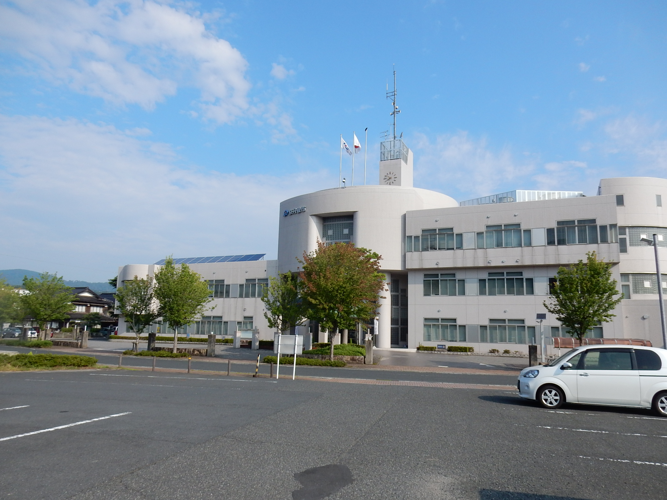 京丹後市役所峰山庁舎（京都府京丹後市峰山町杉谷）